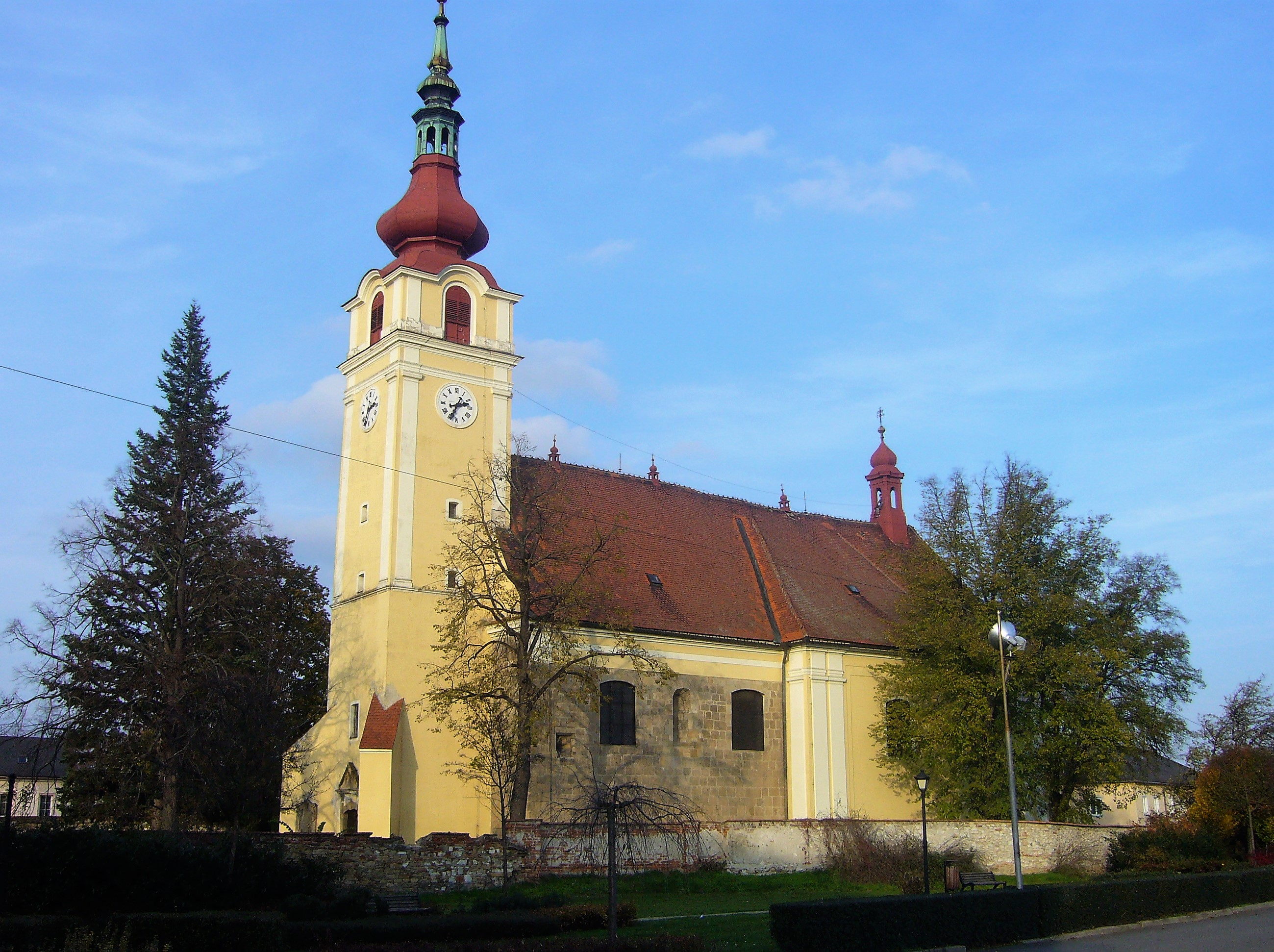 Kostel svatého Václava